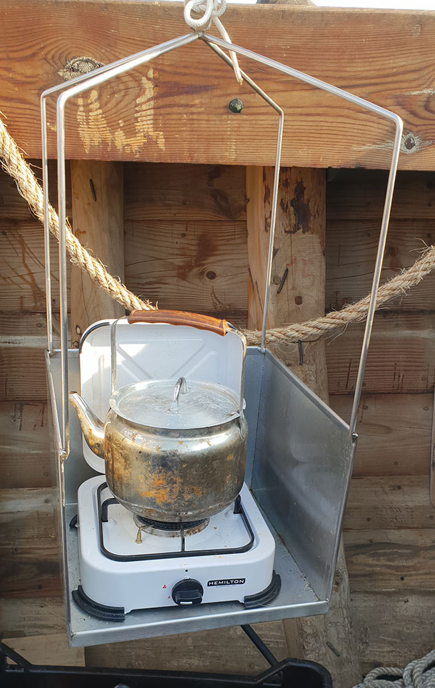 "מטבח" הספינה